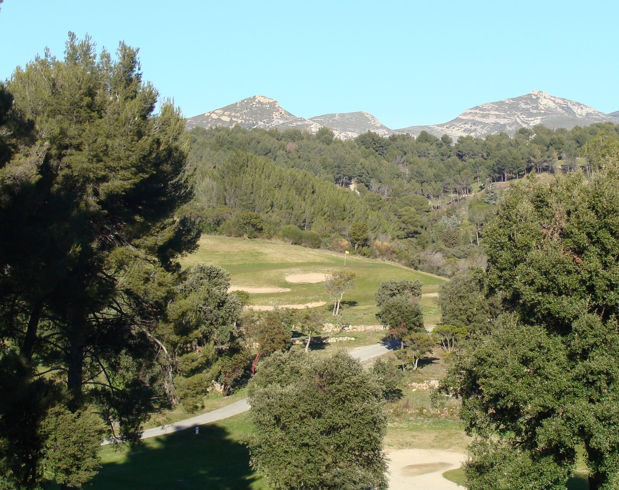 Vue partielle du golf de la Salette à la Valentine (Marseille) ; au fond, le massif du Garlaban